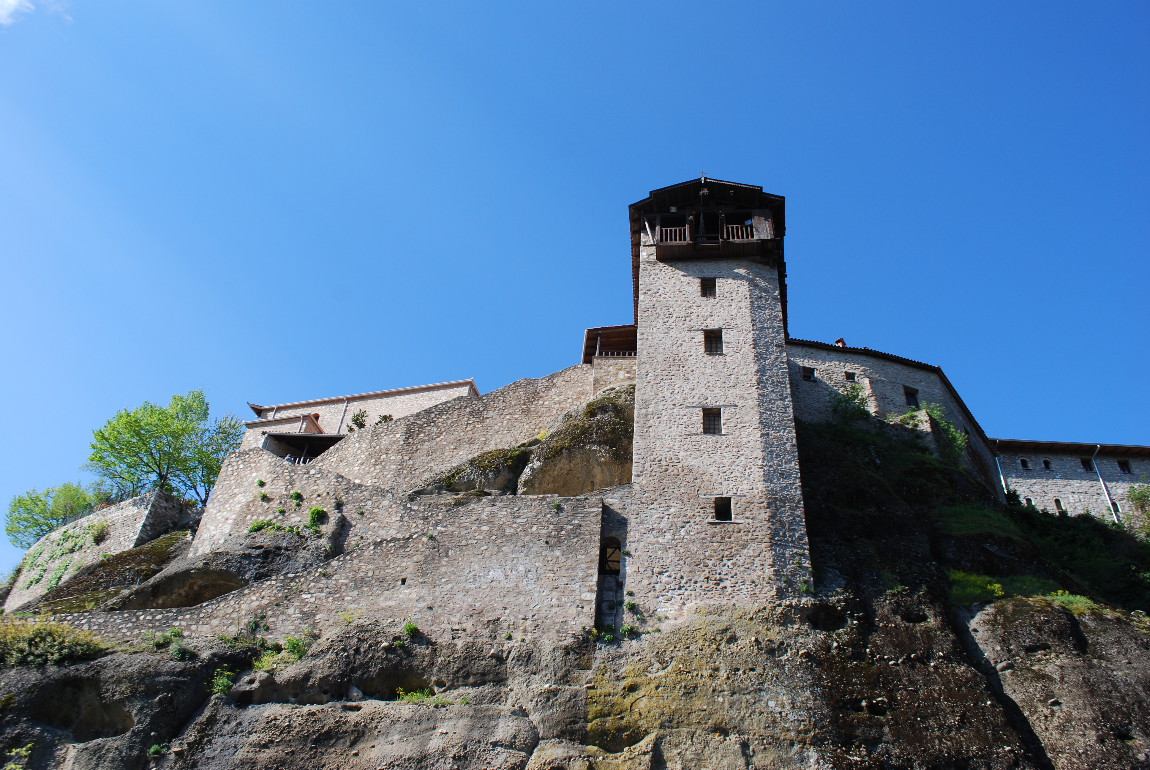 Vue du Grand Météore.